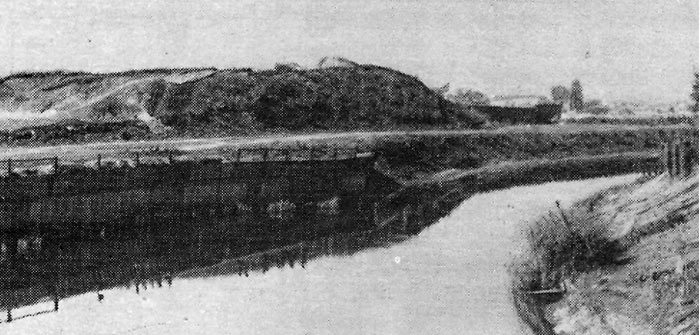 Мінскае замчышча ў XIX ст.